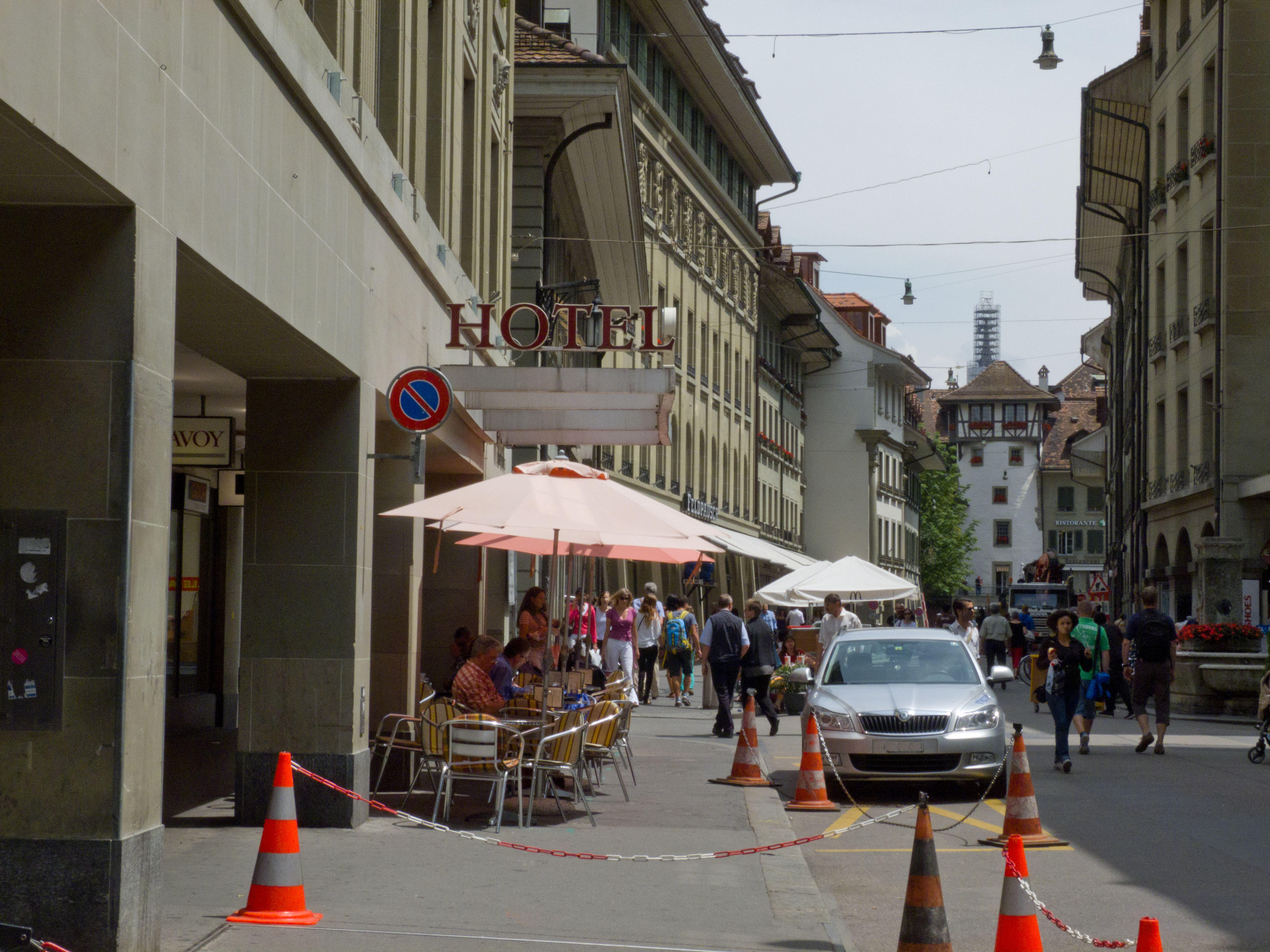 Bern, Neuengasse beim Ryfflihof. Im Hintergrund der Holländerturm